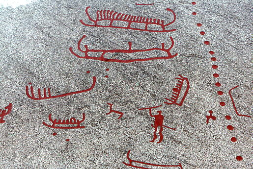 Gravure préhistorique de Tanum, Suède